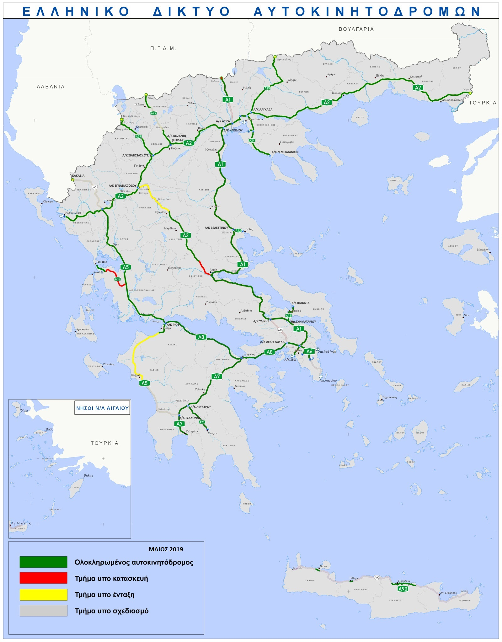 Αρίθμηση ελληνικού δικτύου αυτοκινητοδρόμων και κατάσταση ολοκλήρωσης